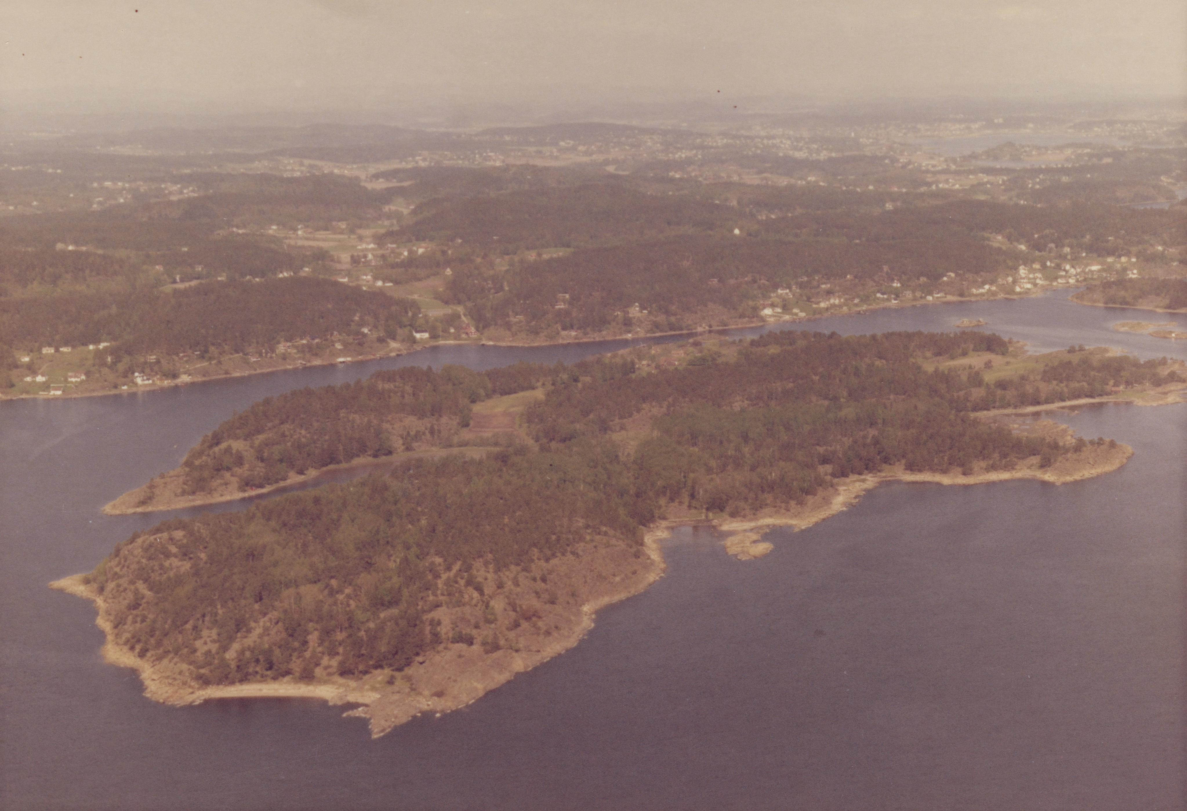 WF.S.166330